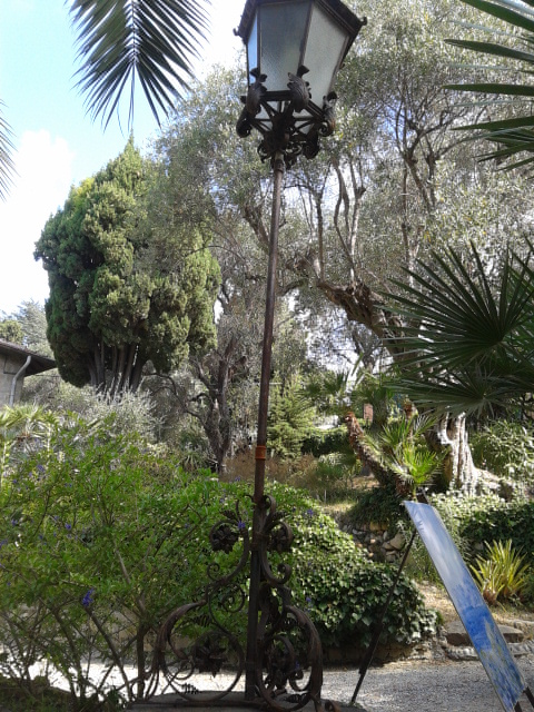 Lampione realizzato da Alessandro Mazzucotelli, Villa Mariani